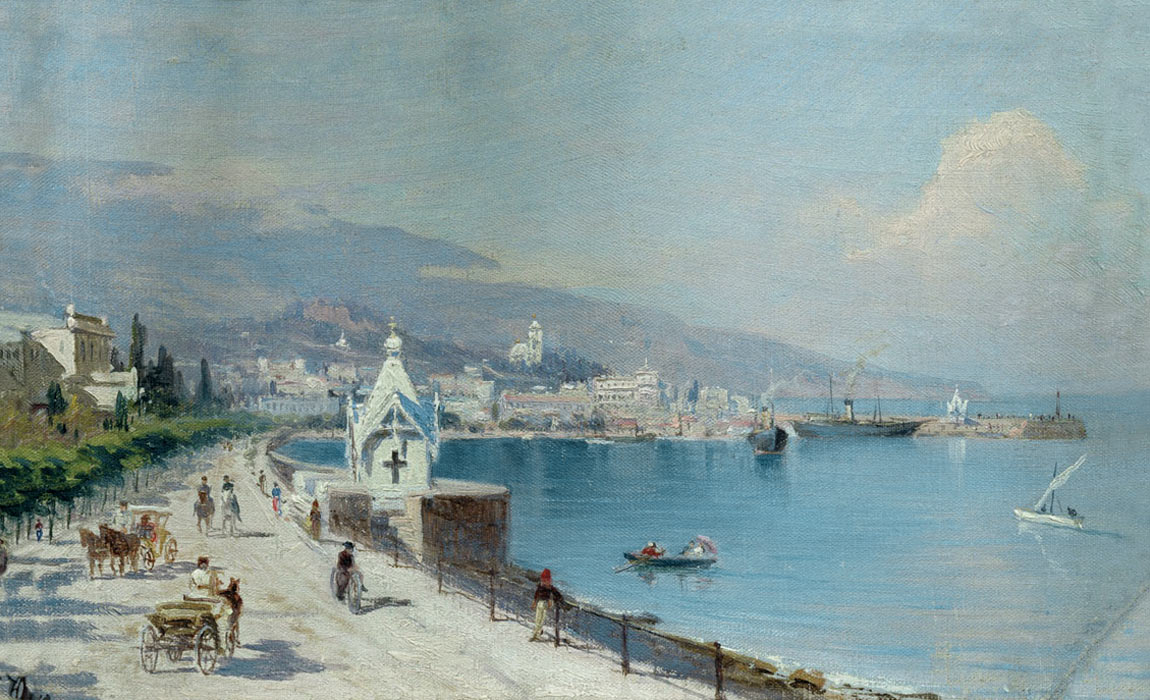 Екатерина Федоровна Юнге. Набережная Ялты, 1880-е